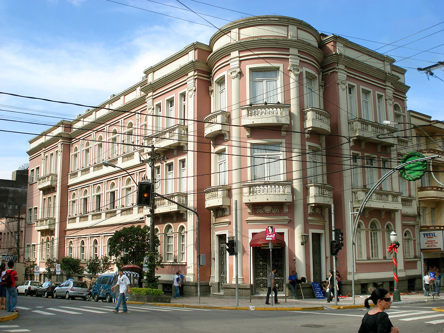 Sede Social do Clube Juvenil, Caxias do Sul, Brasil.